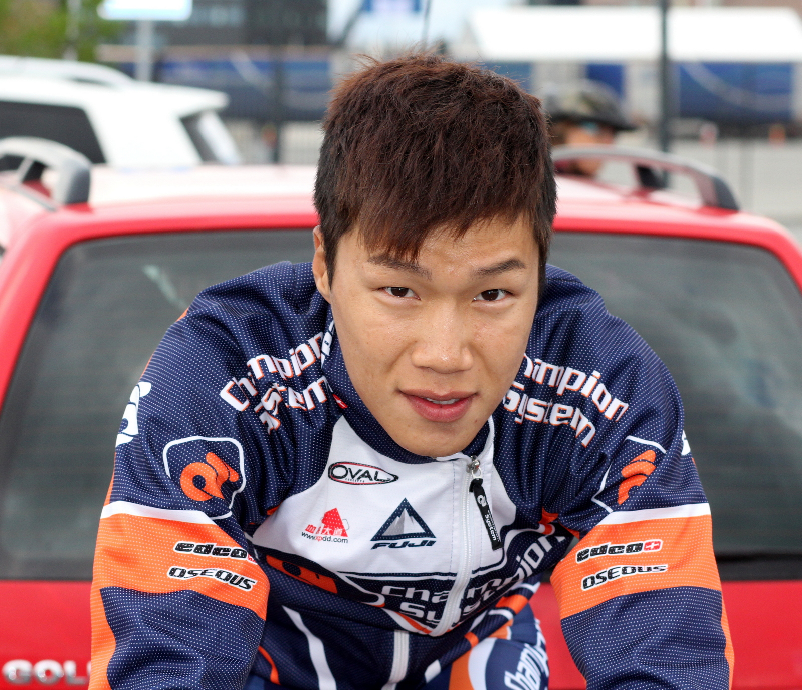 Wu Kin San under Tour des Fjords 2013